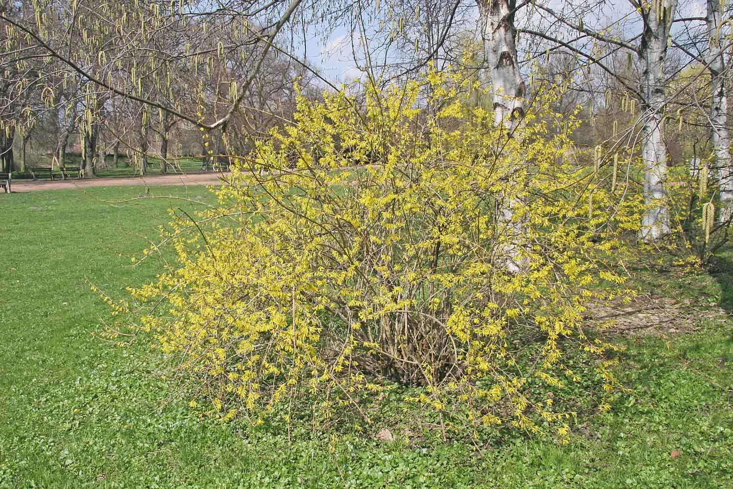 Zlatice prosřední autor:Zp